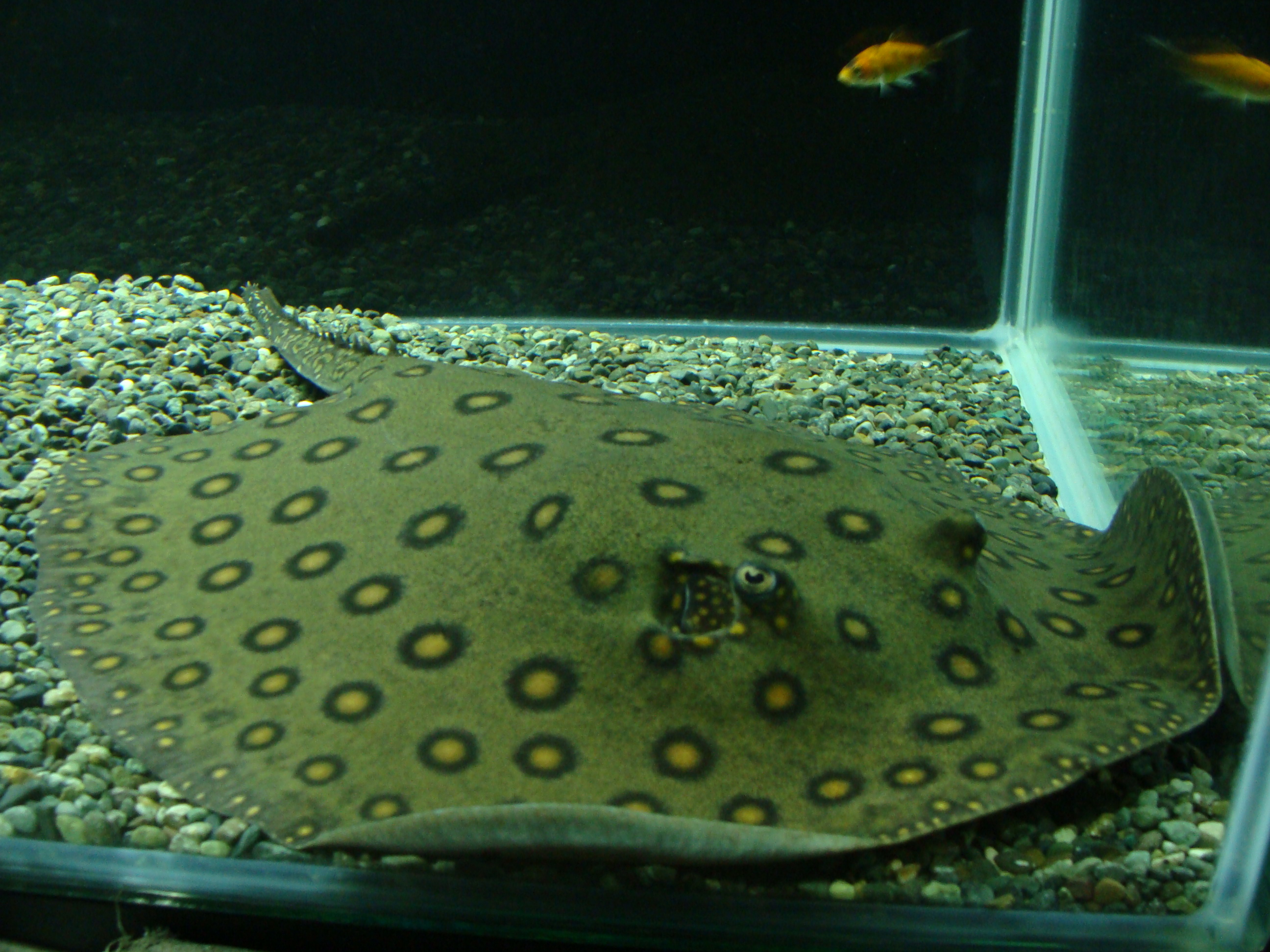 中文（台灣）: 珍珠魟001